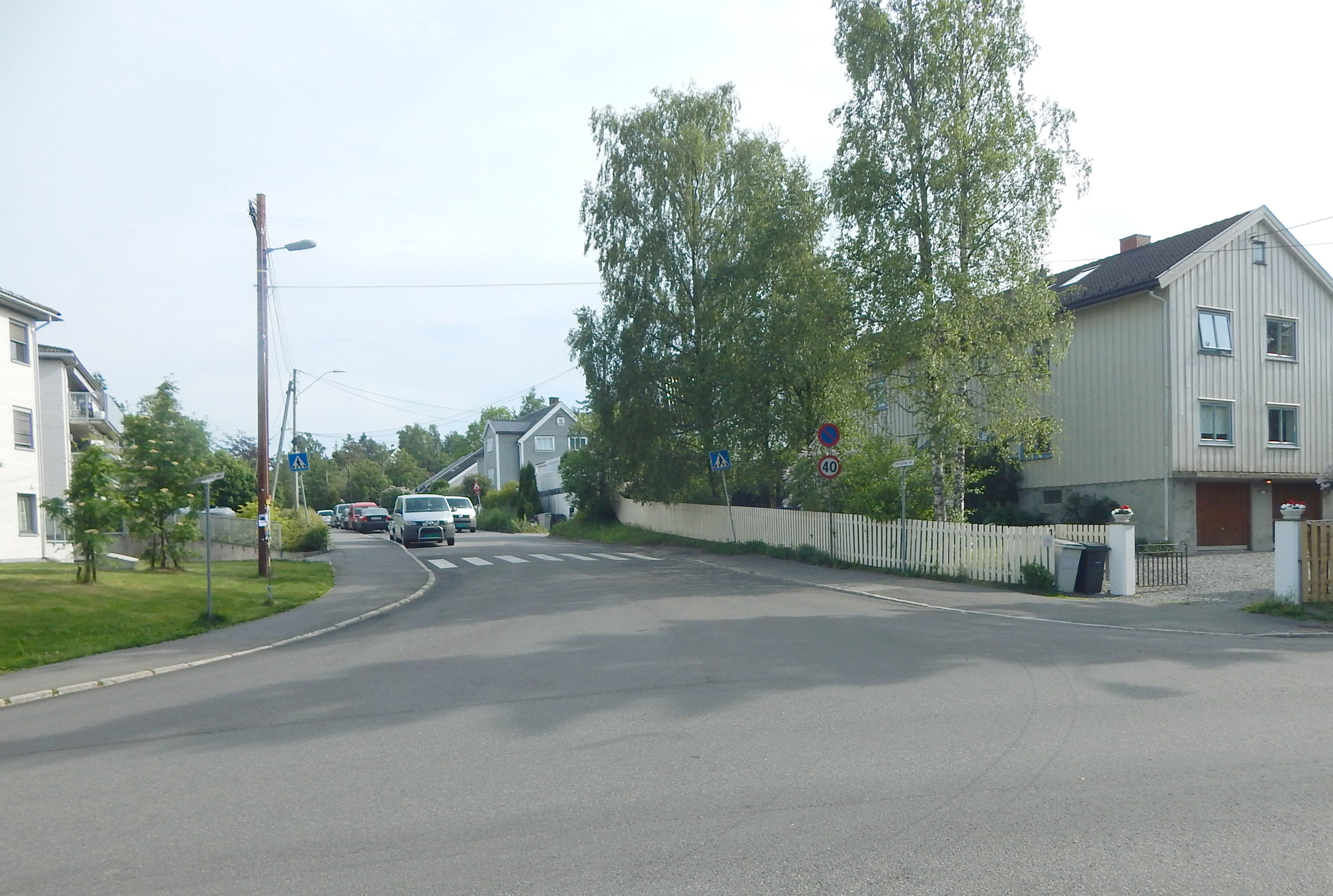 Steingrims vei sett fra Sandstuveien